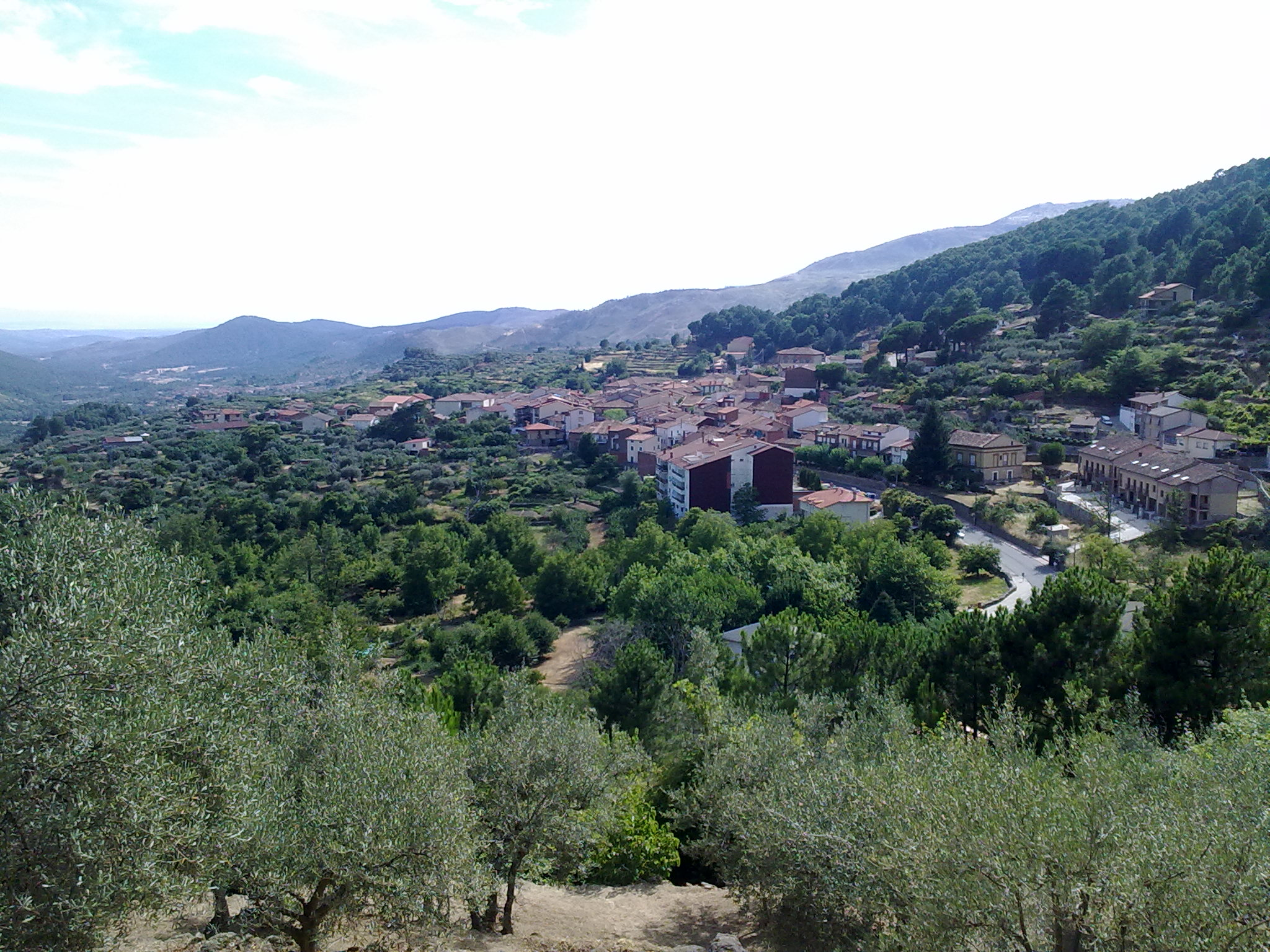 Vista de la Localidad de Villarejo del Valle